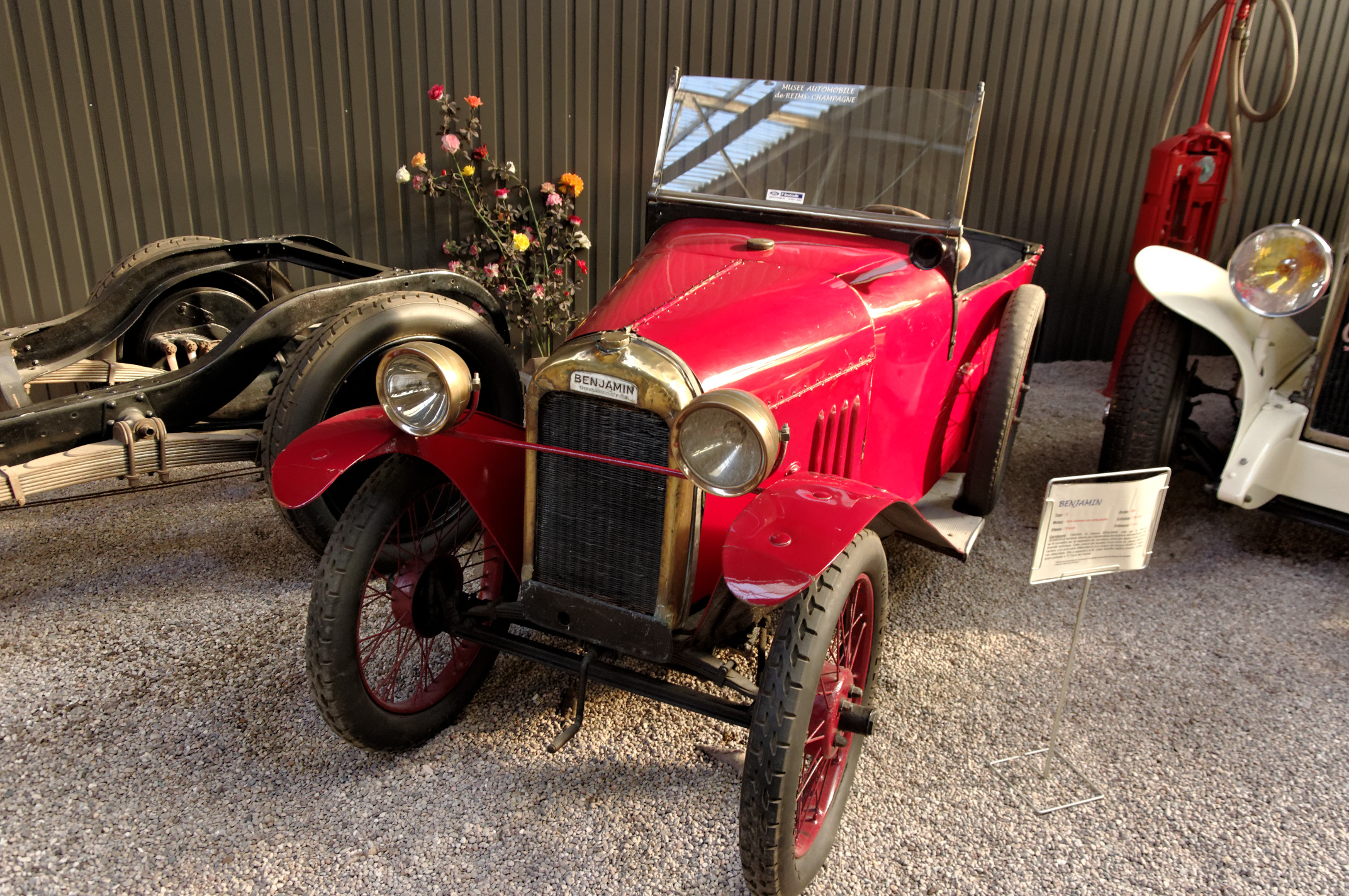 Benjamin C (1921), Cabriolet, Bloc culasse non détachable, 750 cm3, 11 ch., vitesse max. 75 km/h(Musée Automobile Reims Champagne, Reims, Marne, France)